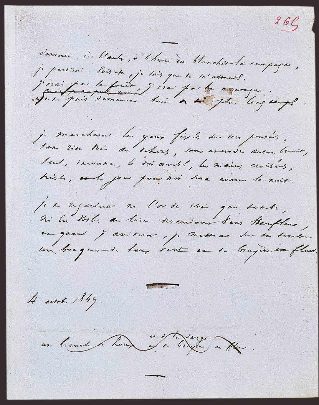 Manuscrit du poème « Demain, dès l'aube... » de Victor Hugo (1847), publié dans Les Contemplations (1856).